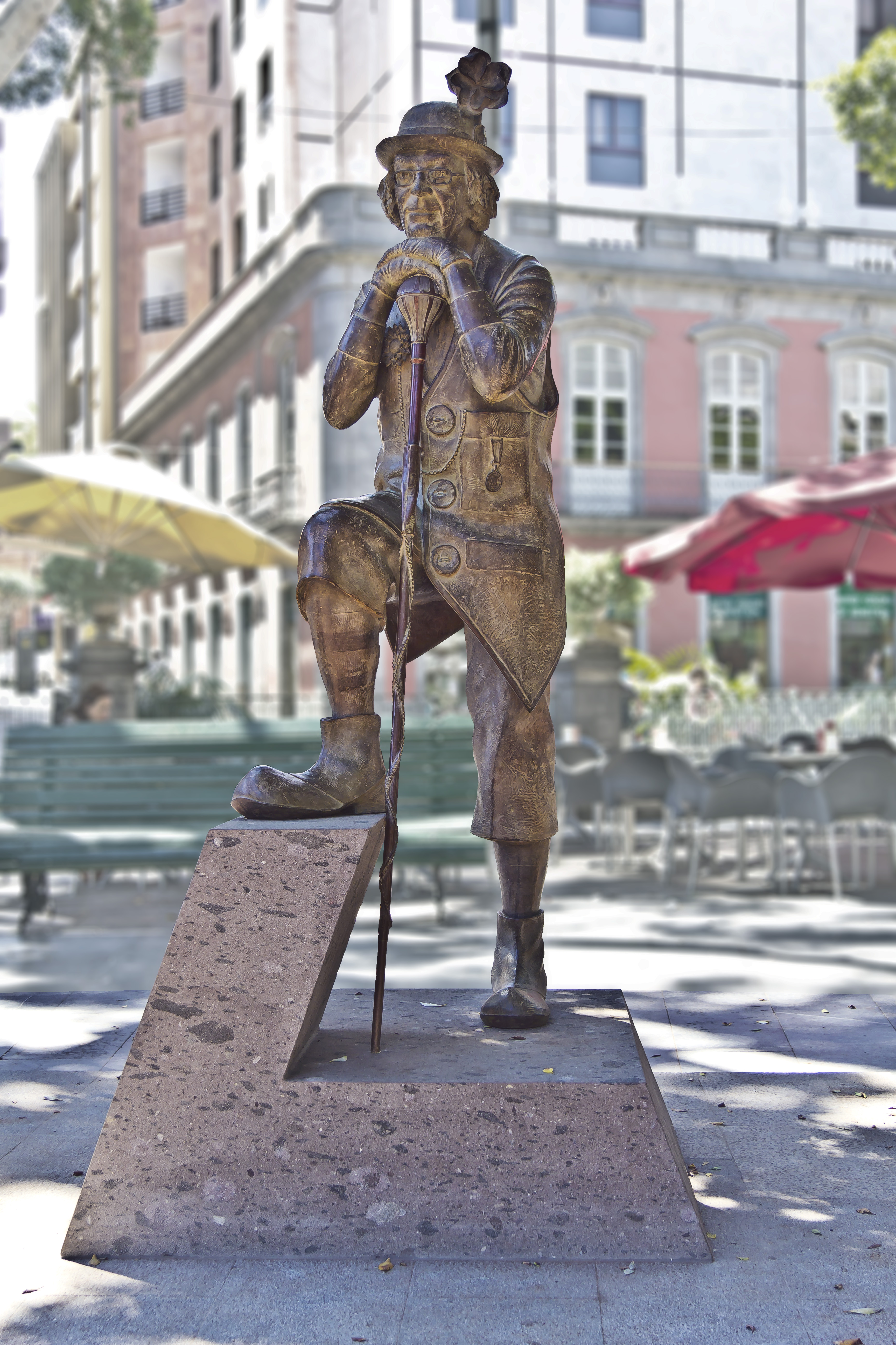 Das Denkmal zu Ehren von Don Enrique González Bethencourt dem Gründer und Leiter der Karnevalskapelle „Murga Ni fu ni fa“ befindet sich seit dem 13. Mai 2013 auf der Plaza del Príncipe in Santa Cruz de Tenerife. Es wurde von der Werkstatt „Bronzo“ in La Laguna geschaffen.